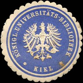 Sealing stamp Title: Königliche Universitäts - Bibliothek - Kiel Description: blau, weiß, geprägt Place: Kiel size: 4 cm